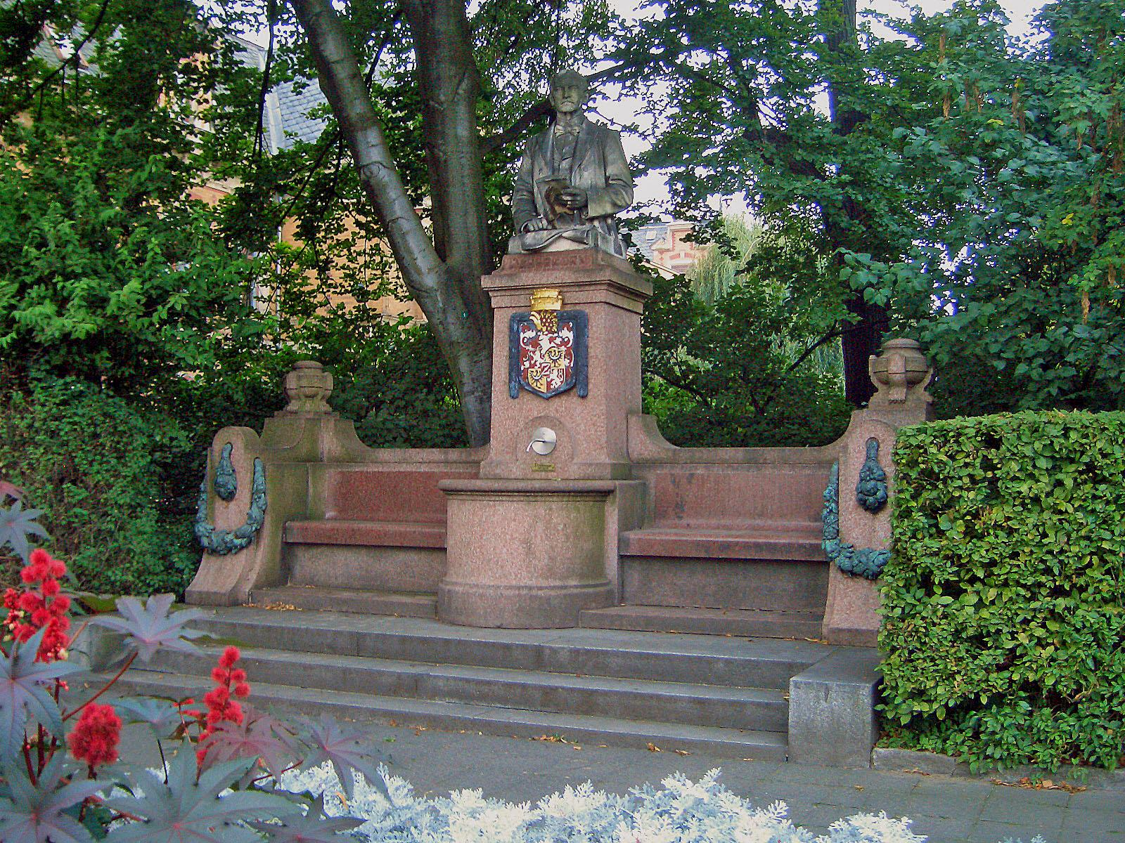 Haberkorndenkmal am Haberkornplatz in Zittau neben dem Postamt